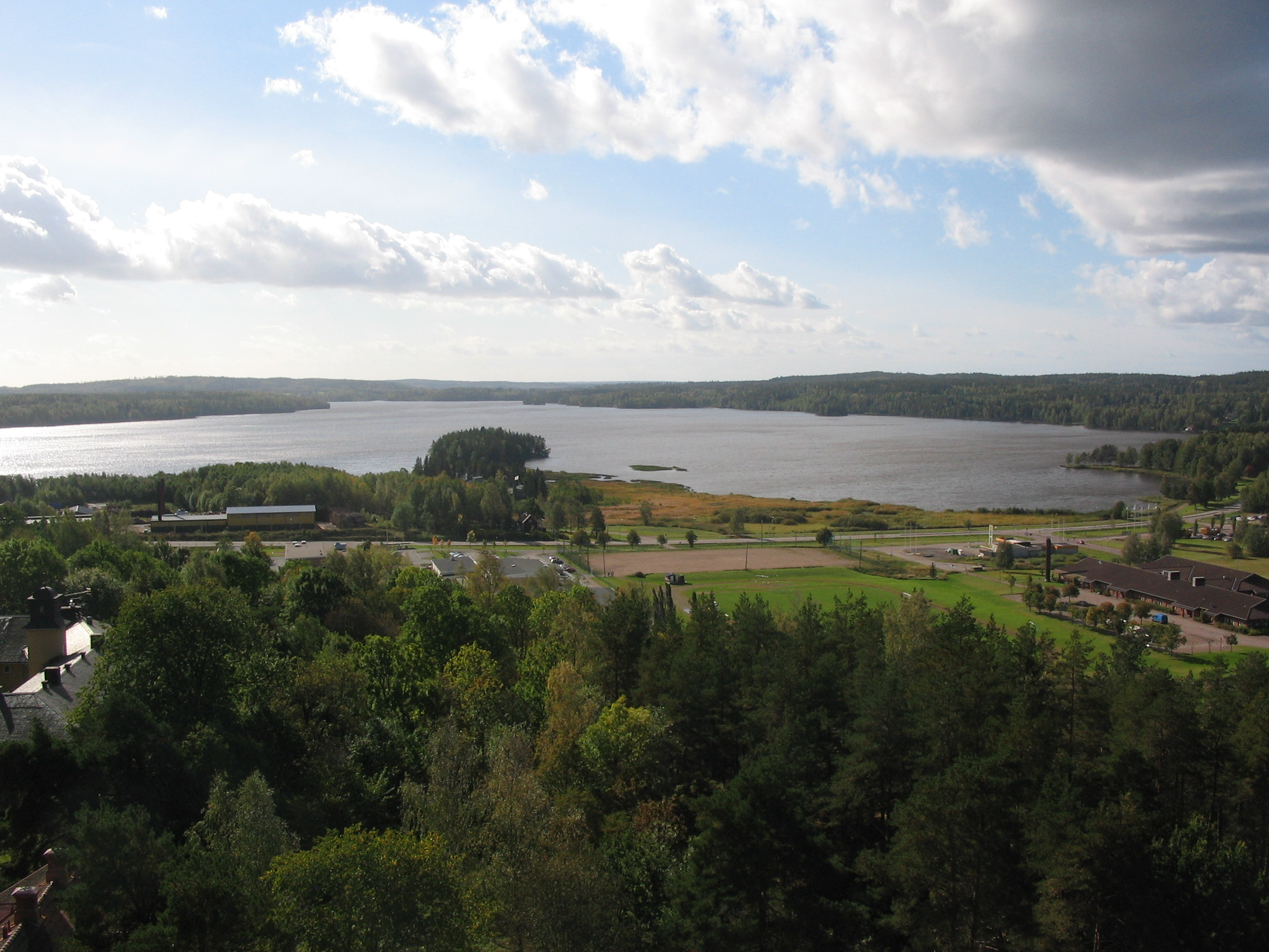 Foto över Molkom